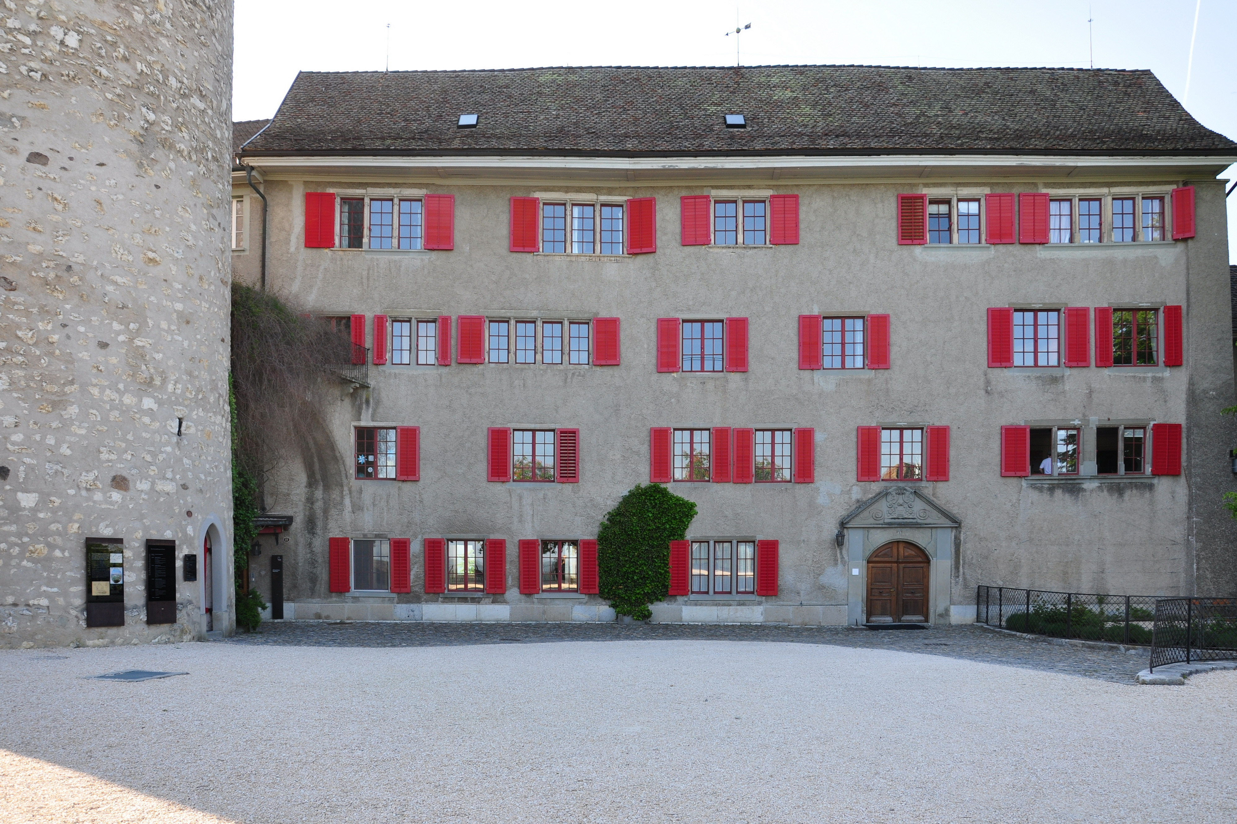 Schloss Regensberg as seen from Lägern (Switzerland)